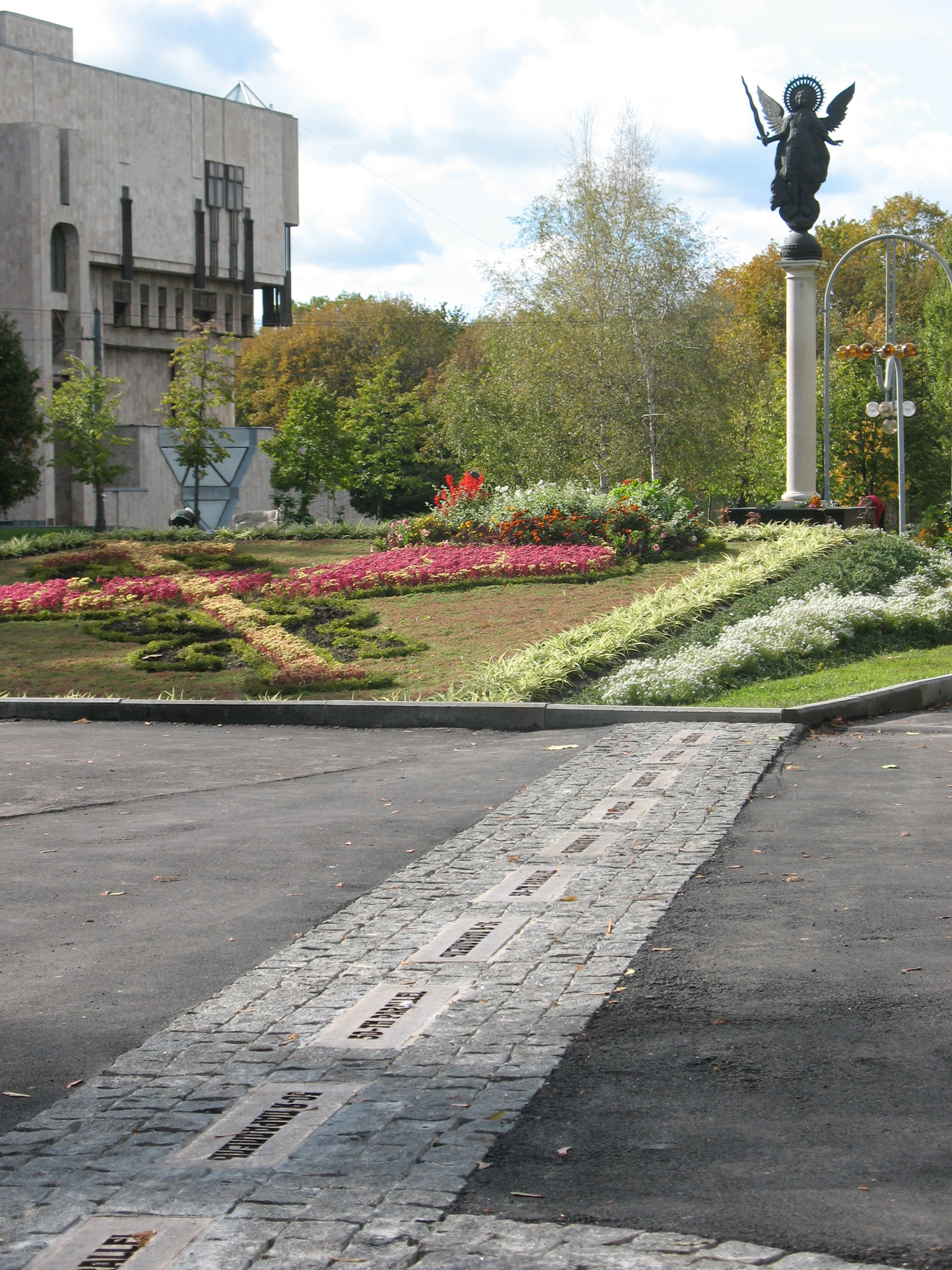 Памятник 50-й параллели (линия самой параллели) и памятник Архангелу Михаилу в Харькове. Слева на клумбе герб города из цветов.